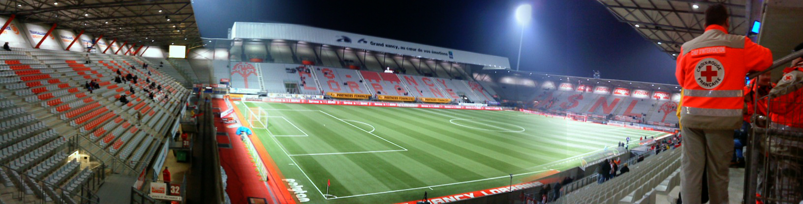 Vue panoramique des tribunes du stade Marcel-Picot avant le match opposant l'AS Nancy-Lorraine au FC Sochaux.